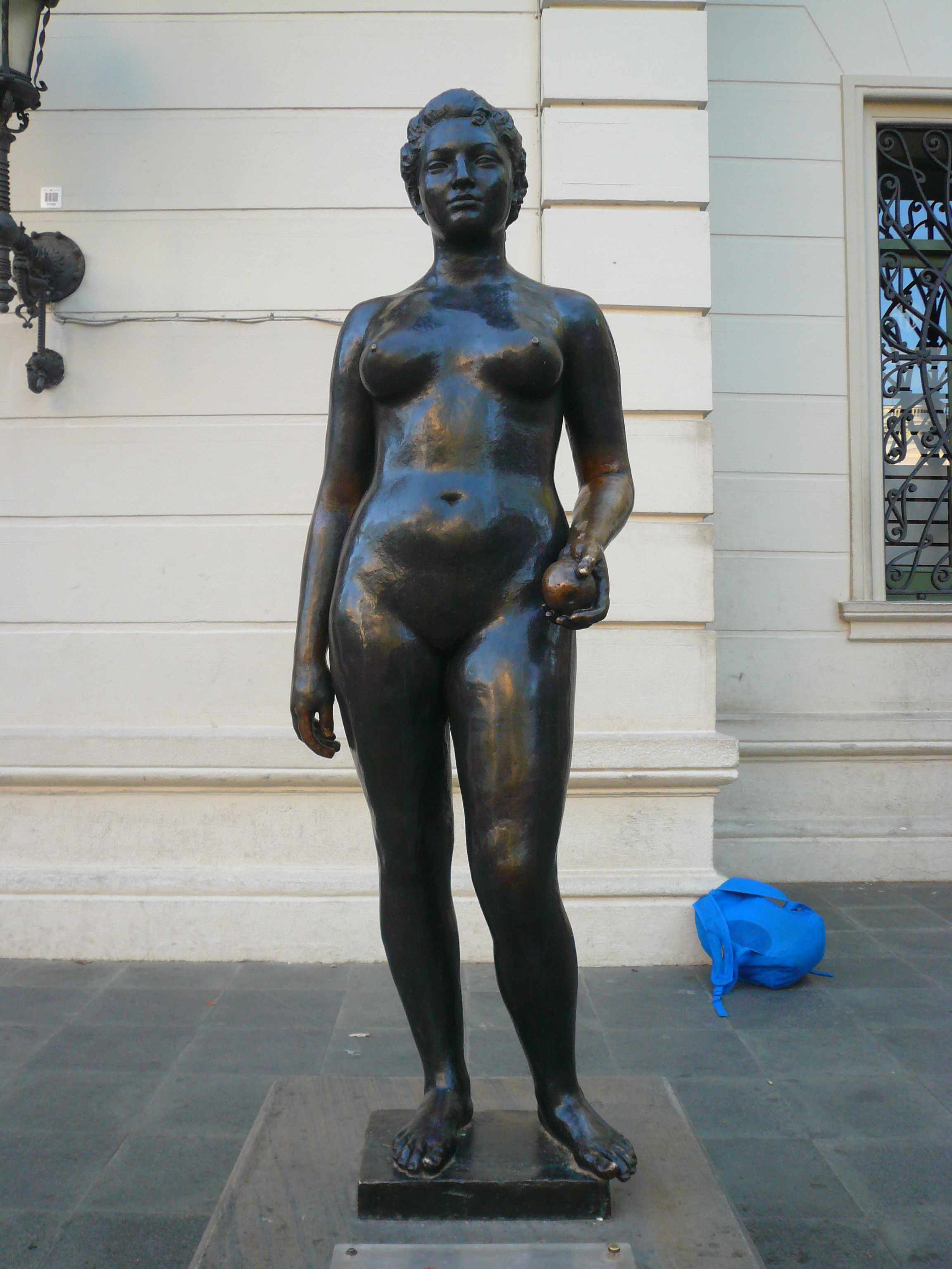 Pomona, de Josep Clarà, davant de l'ajuntament de Sarrià.